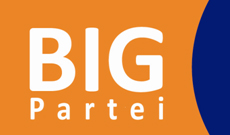 Logo des Bündnis für Innovation und Gerechtigkeit